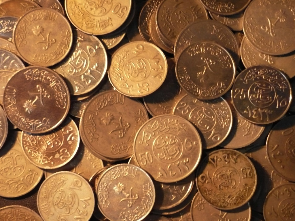 സൗദി അറേബ്യയിലെ നാണയങ്ങൾ